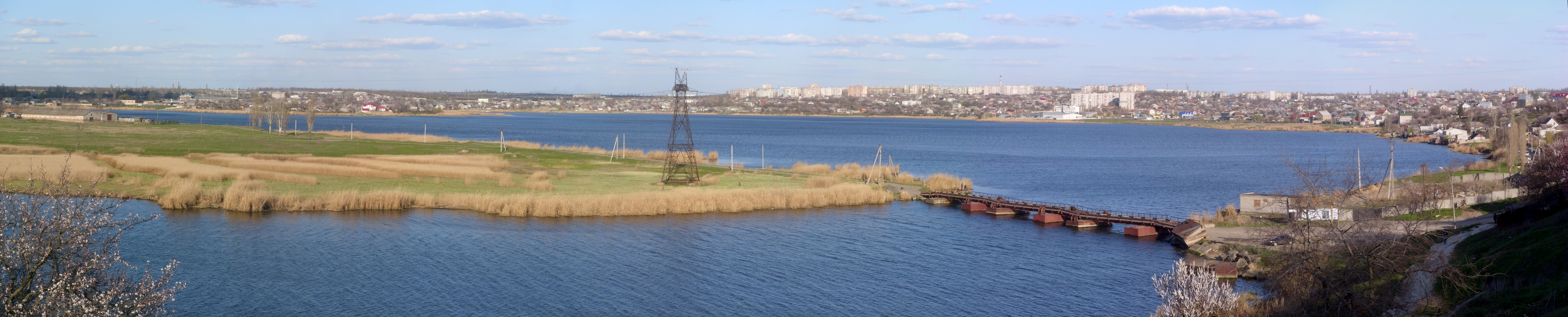 Миколаївська весна у Вікіпедії п-ов Аляуды, г. Николаев